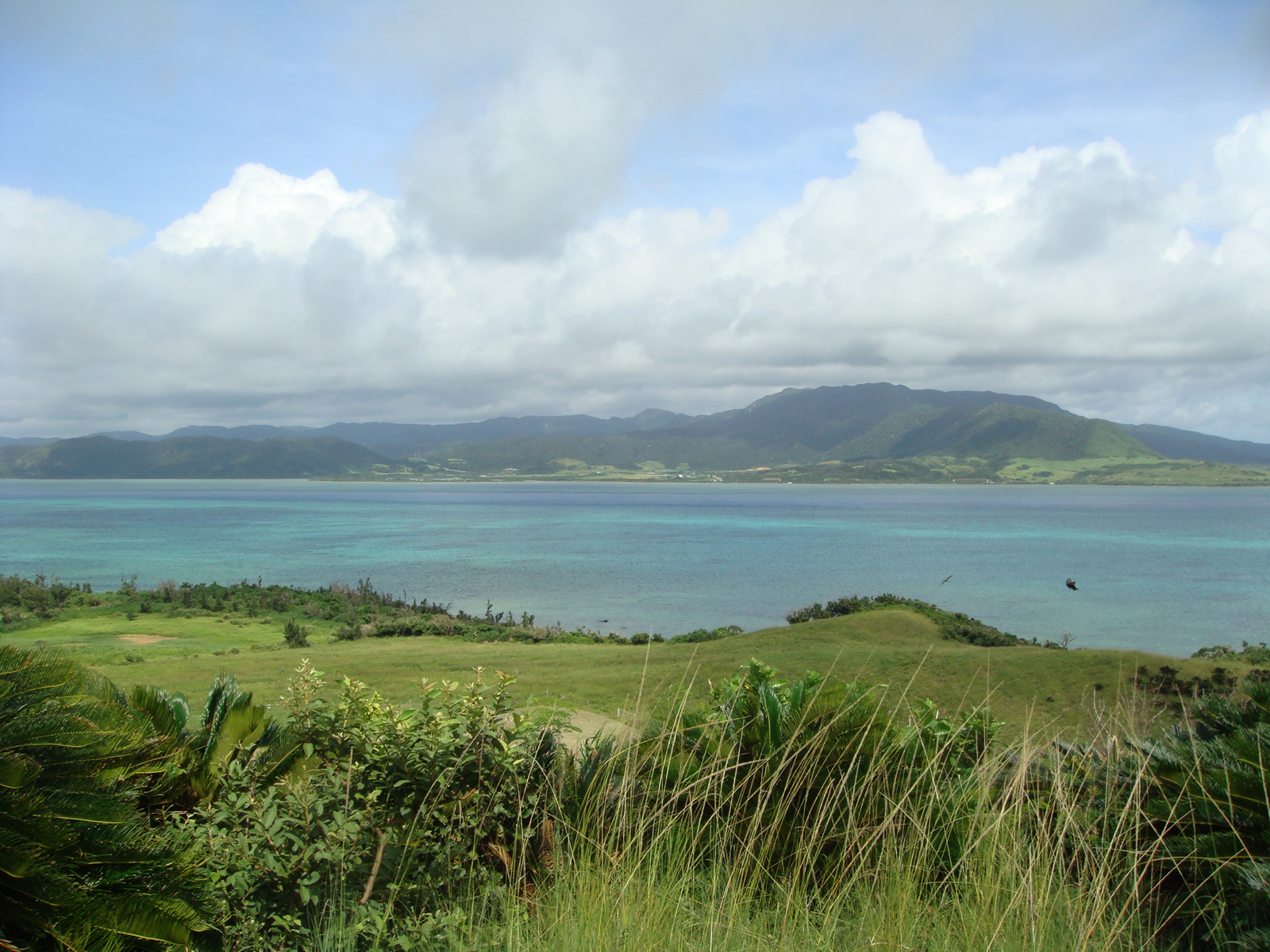 ちゅらさん展望台からのヨナラ水道の眺め（沖縄県八重山郡竹富町/小浜島）